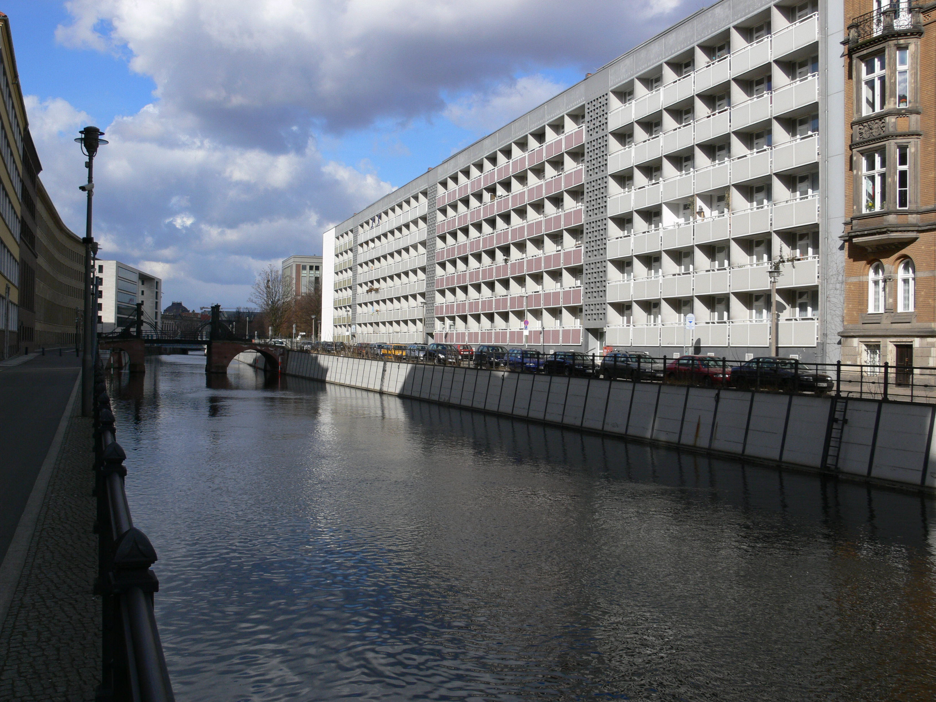 Friedrichsgracht Berlin (im Hintergrund die Jungfernbrücke)